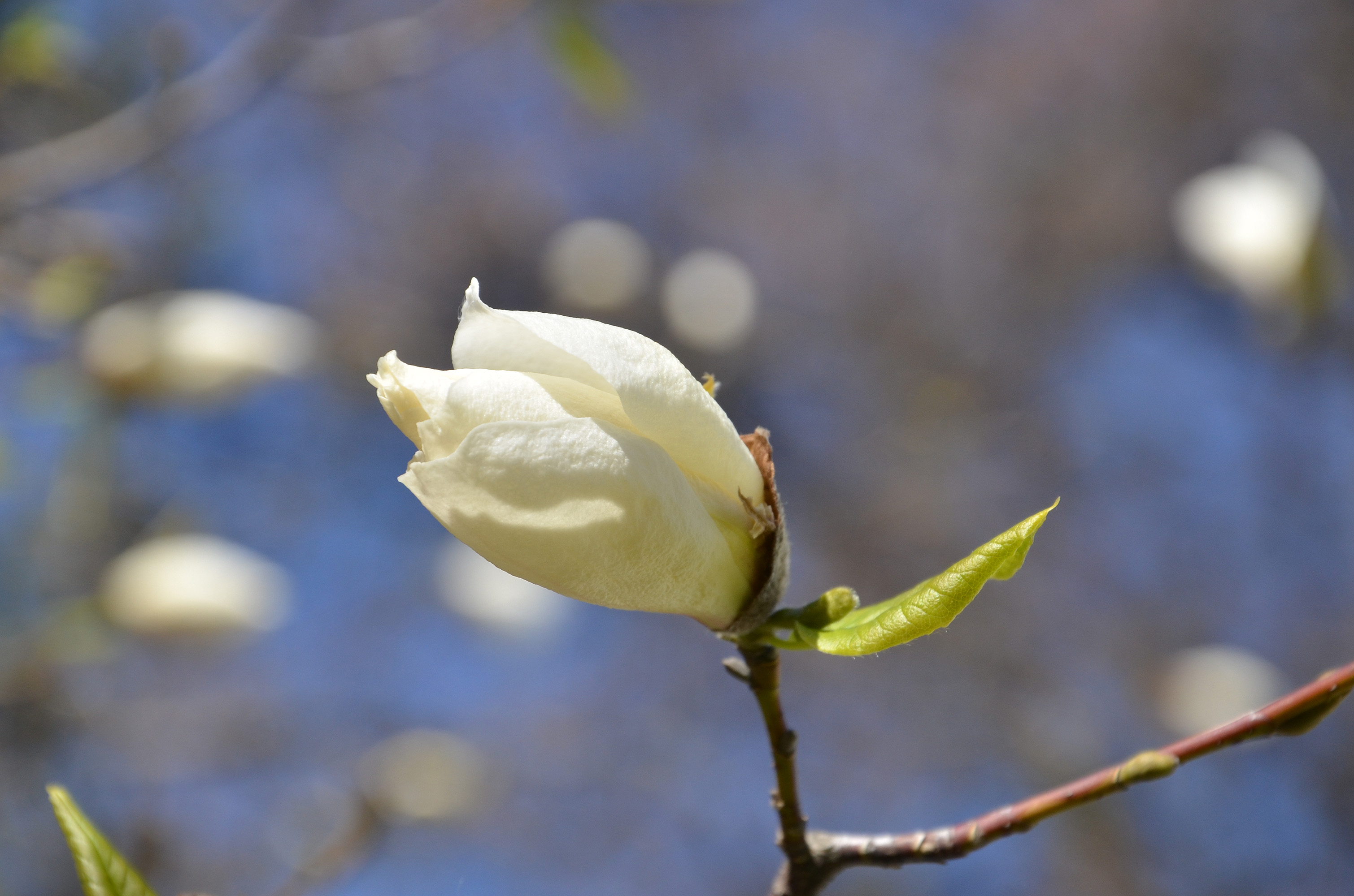 Весняний цвіт «Тернопільських магнолій».